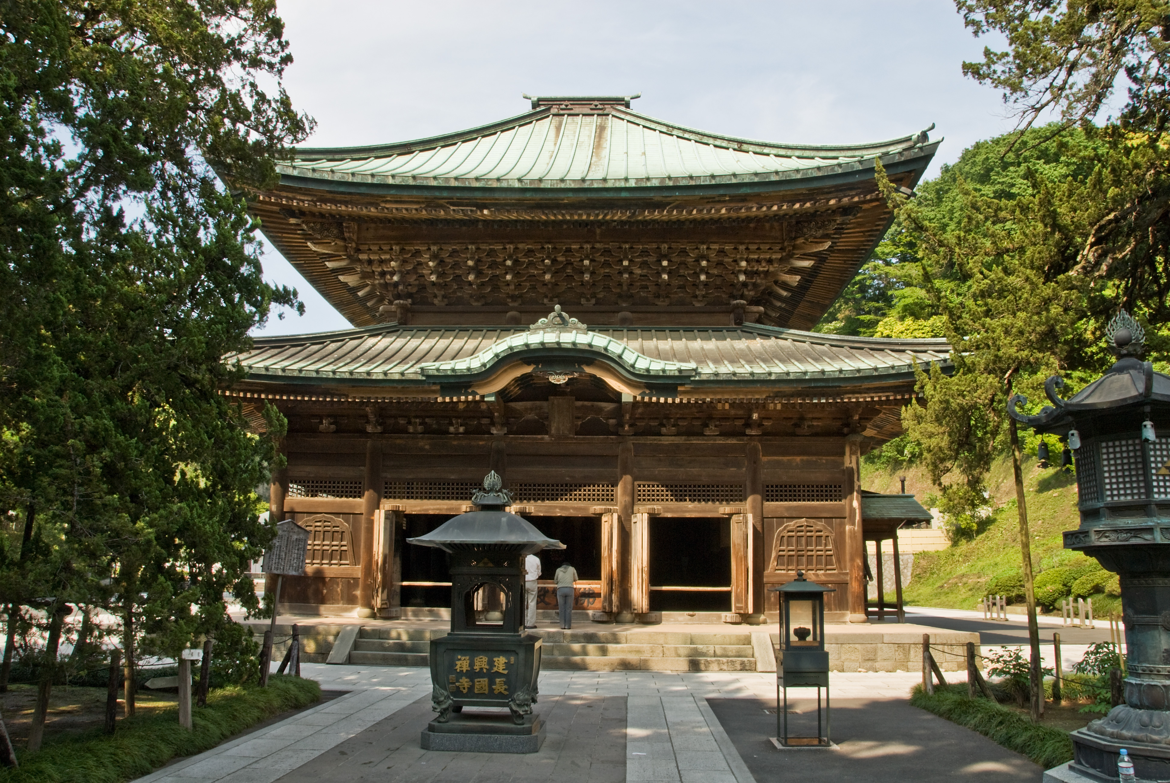 Kencho-ji, Kamakura